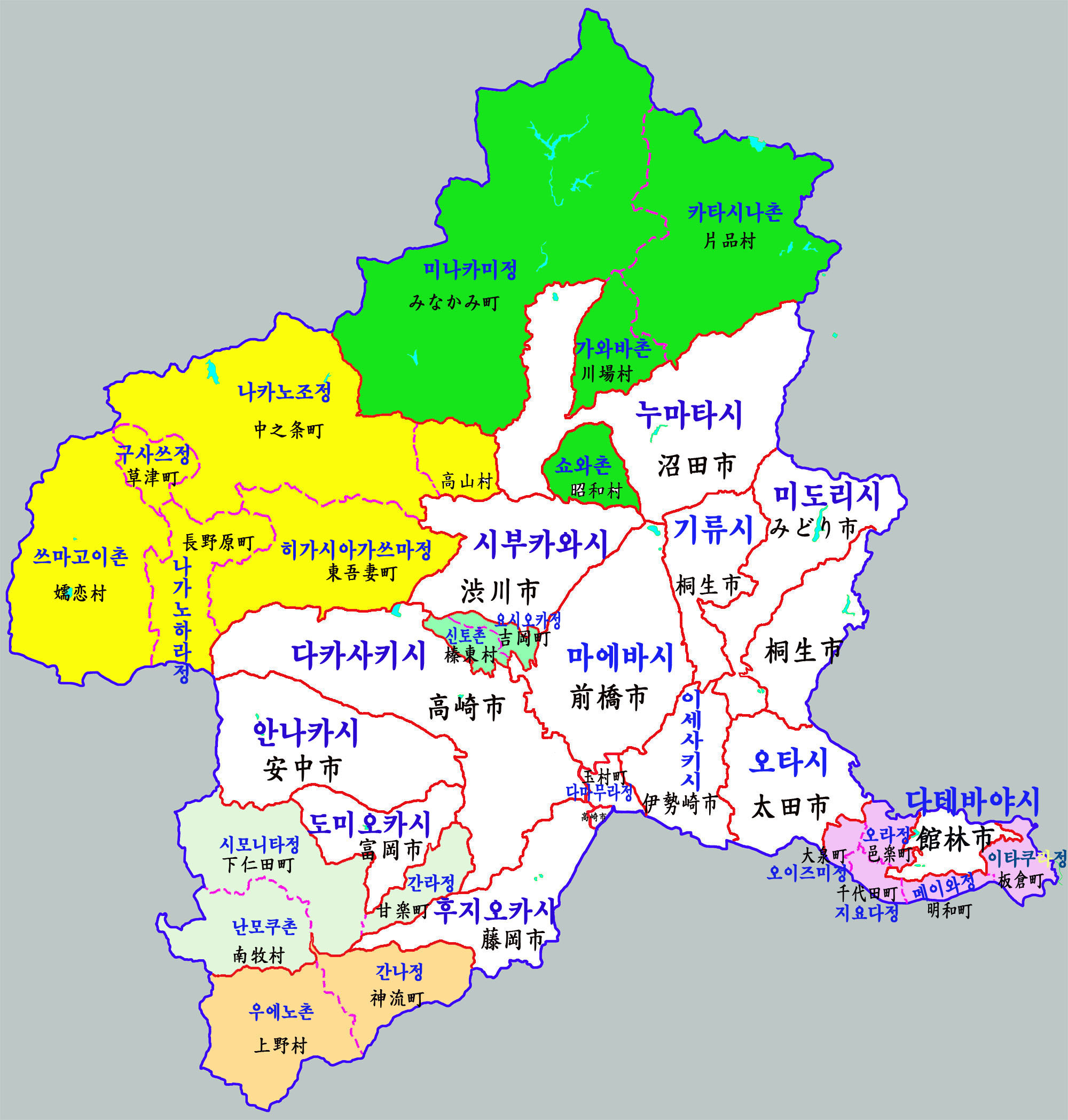 군마현 행정구역